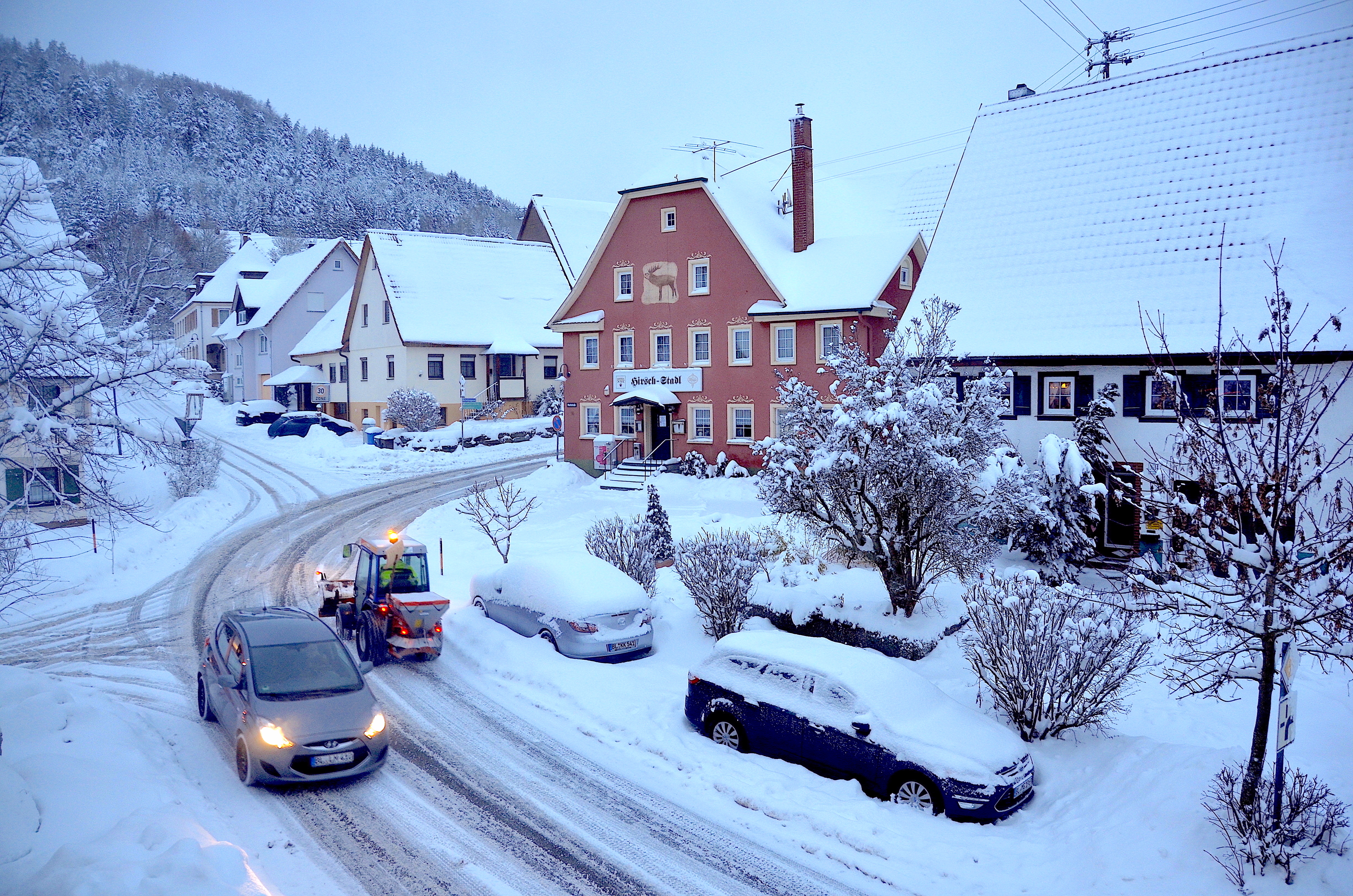 Schneebedeckte Straße in Tieringen, Baden-Württemberg